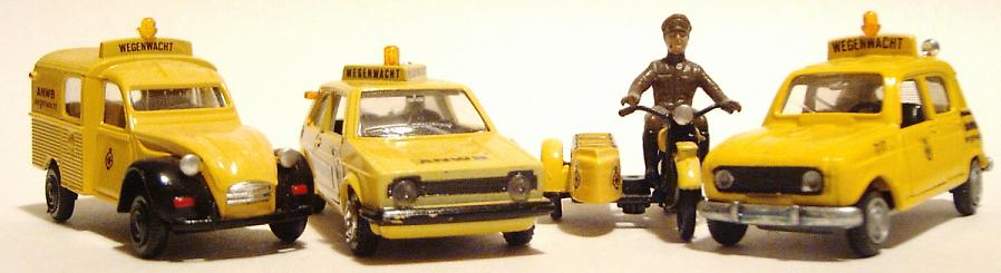 AHC models ANWB set uit nl:1982